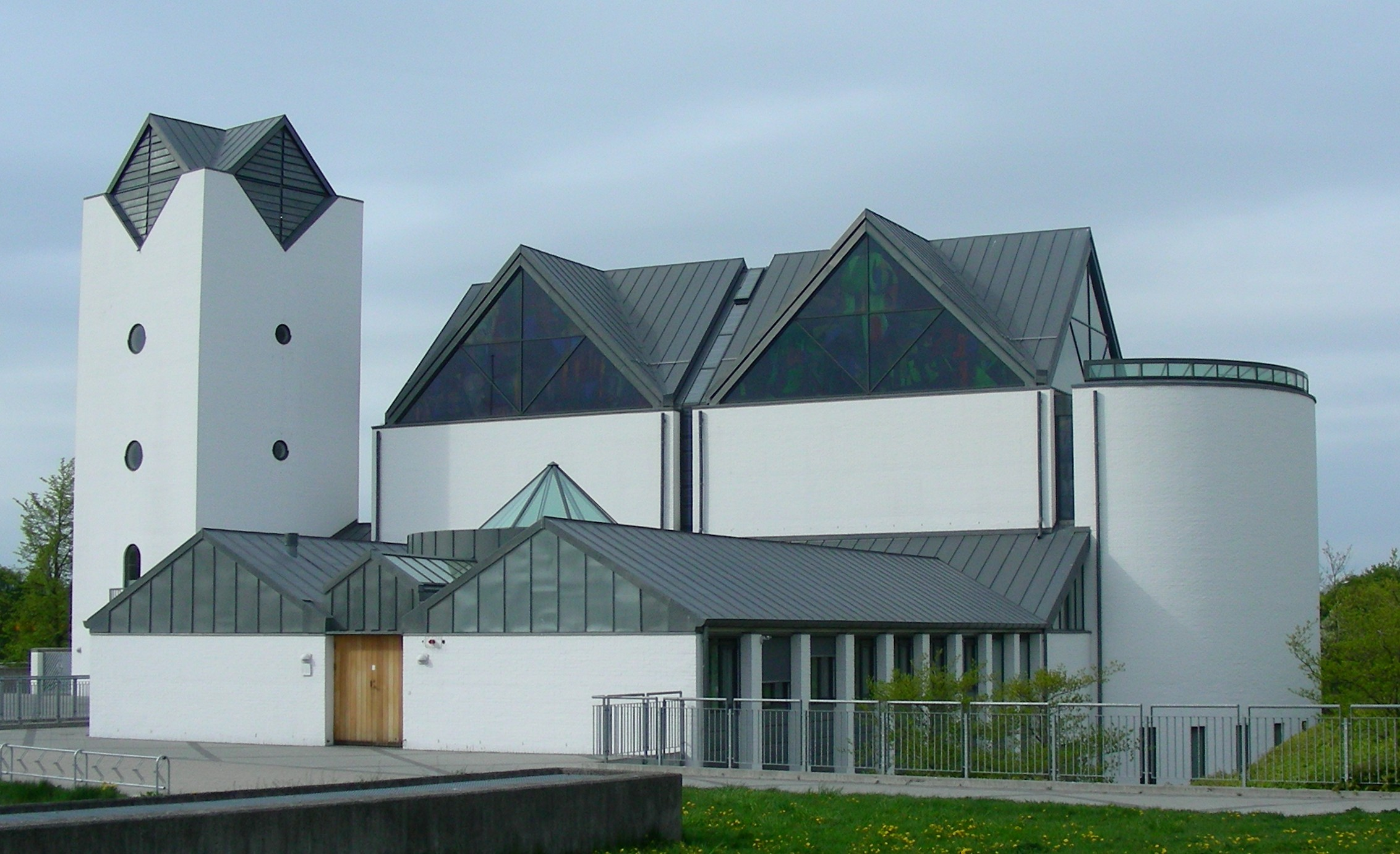 Vejleå kirke, Ishøj, Denmark